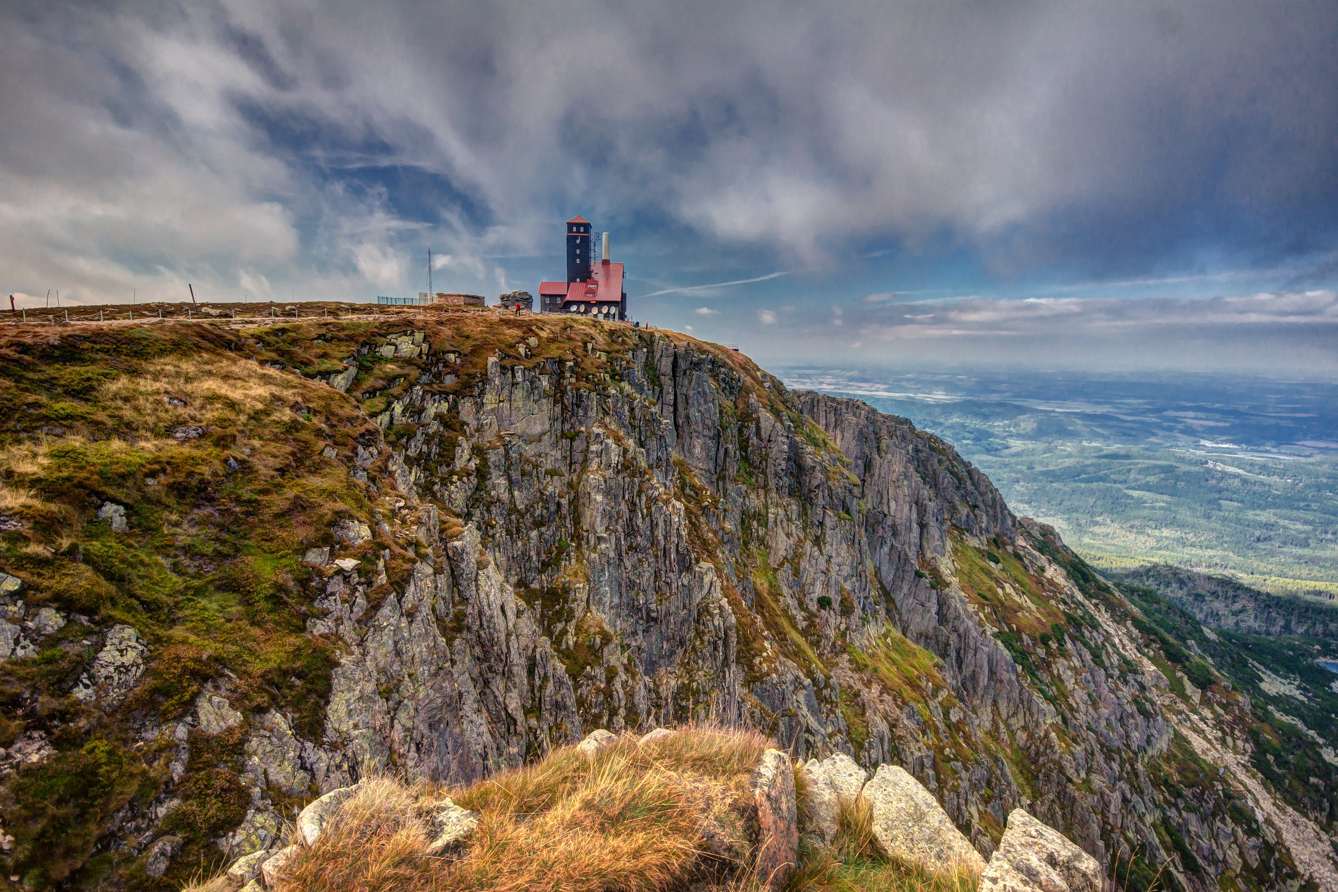 Specjalny obszar ochrony siedlisk Karkonosze. This is a photography of Natura 2000 protected area with ID PLH020006